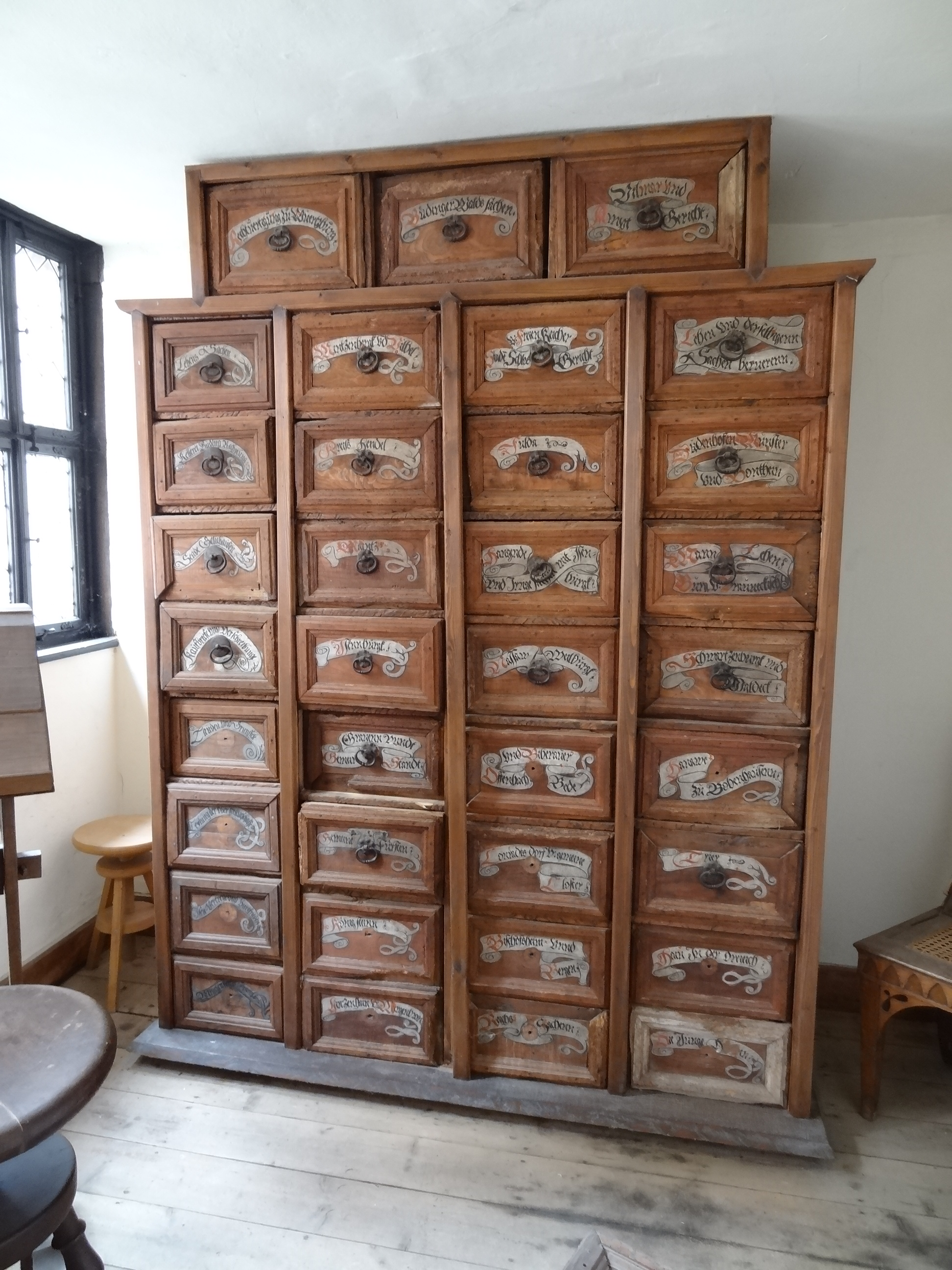 Burg Ronneburg